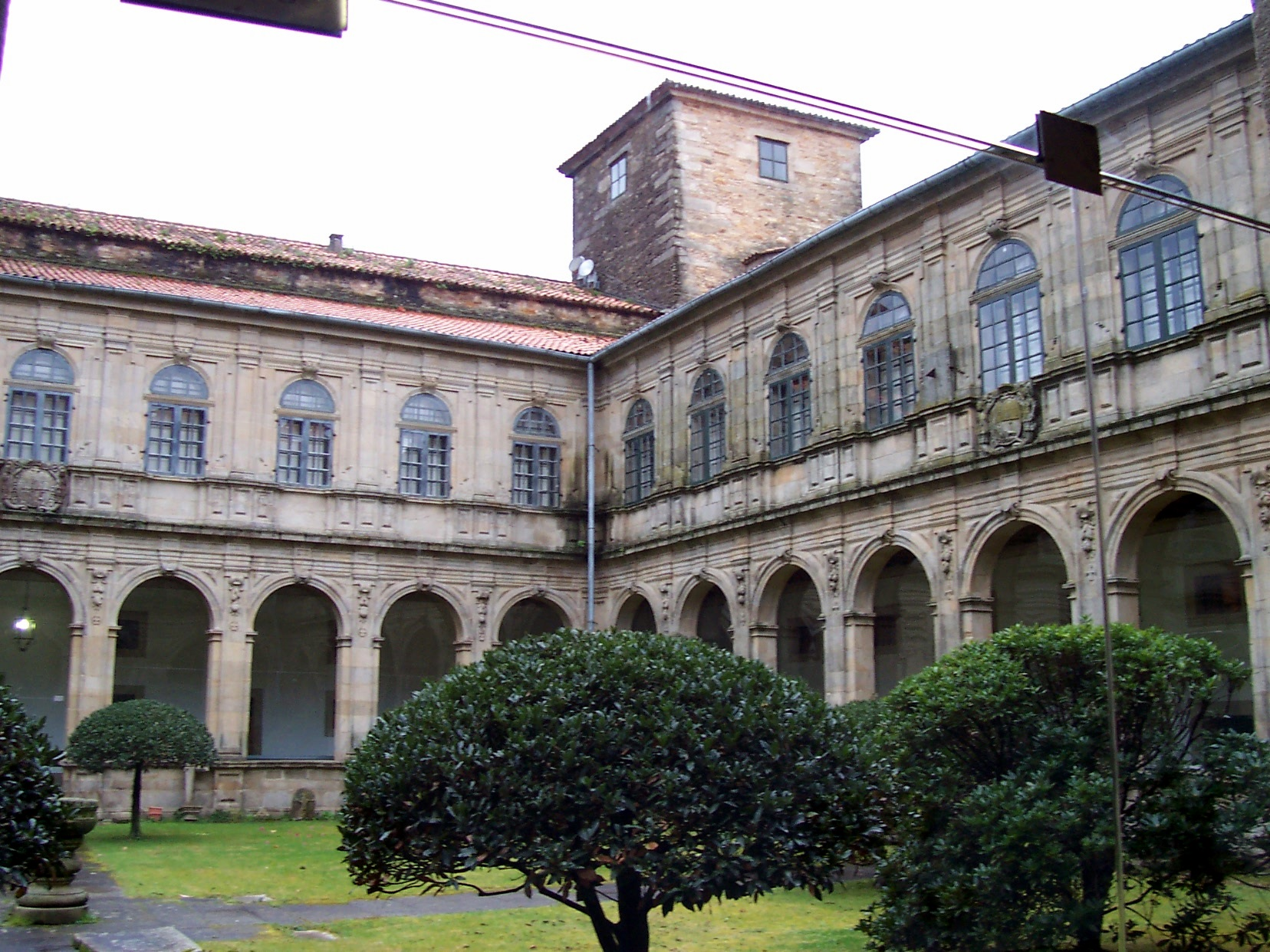 Patio do Museo do Pobo Galego, Santiago de Compostela Categoría:Imaxes de Santiago de Compostela